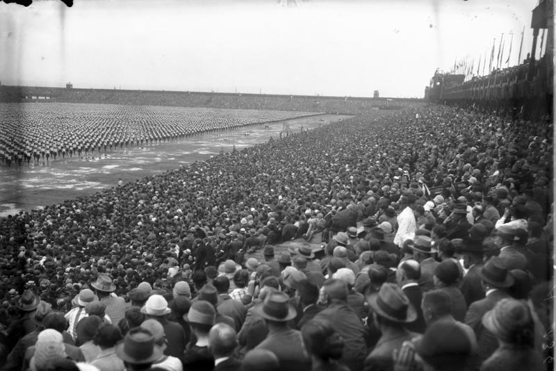 Das grösste Turnfest der Welt ! Das Sokolfest in Prag. Alle 5 bis 6 Jahre treffen sich die in dem Sokol-Verband zusammengeschlossenen Frauen und Männer zu einem Turnfest bei welchem mitunter 30 bis 40 000 Teilnehmer zusammenkommen. Blick in das Prager Stadion während der Massenfreiübungen der Sokols.